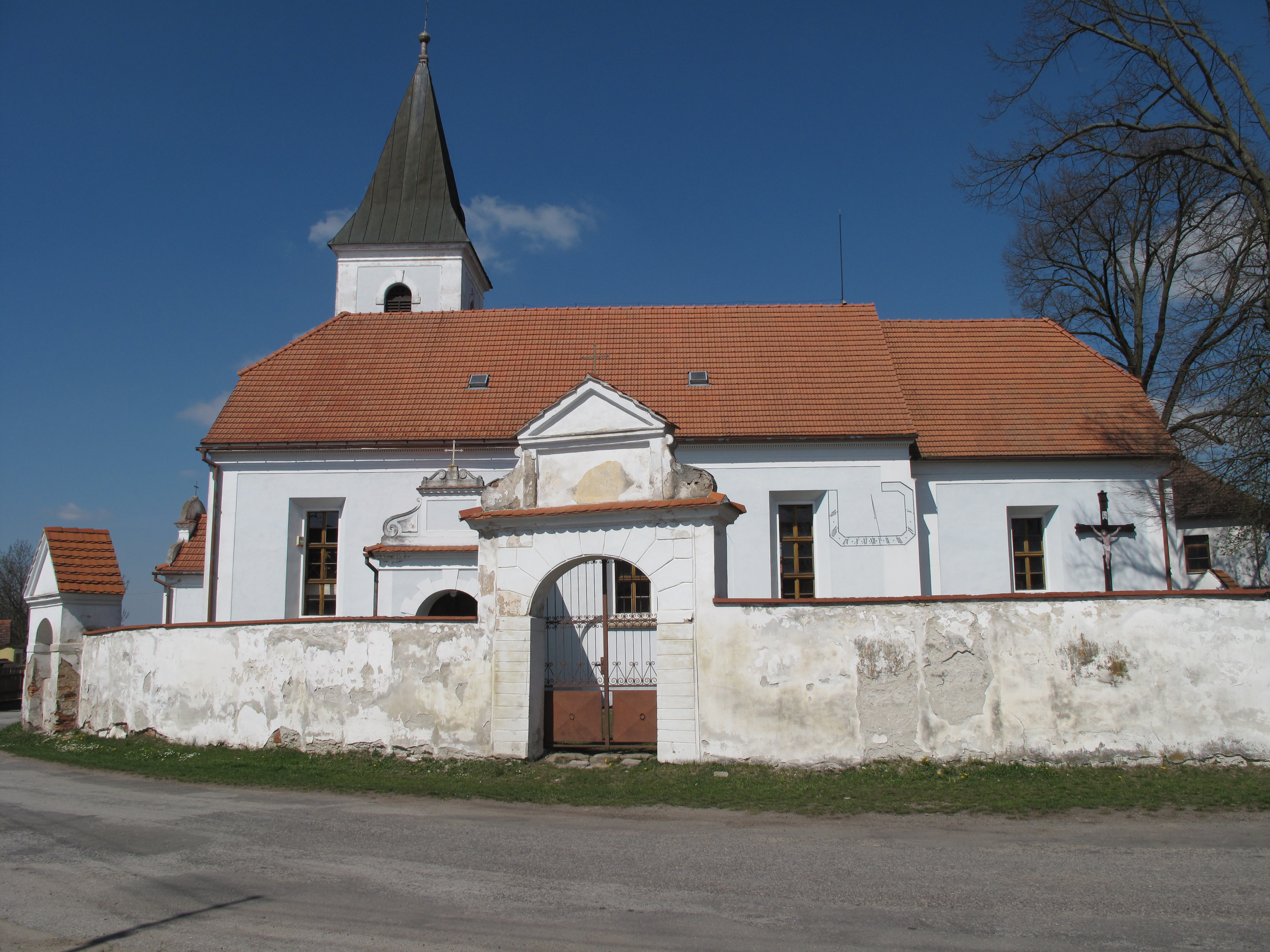 Kostel v Modré Hůrce. Okres České Budějovice, Česká republika.